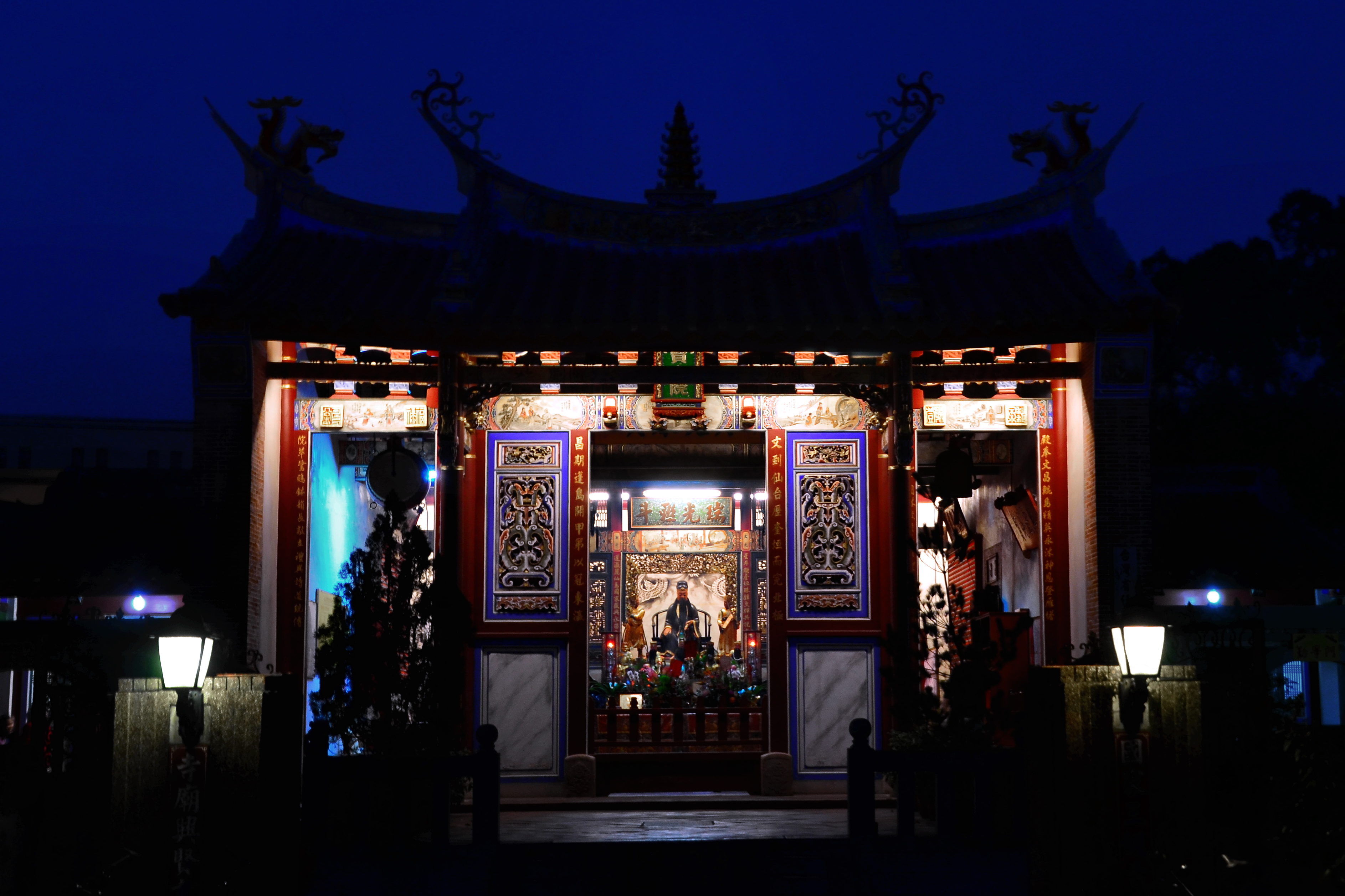 位於彰化縣員林市員林公園內的興賢書院